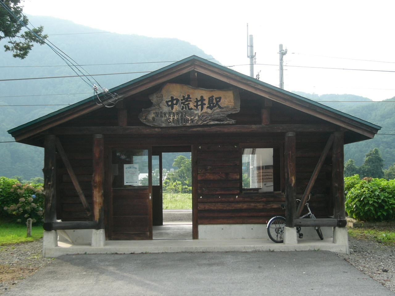 Nakaarai Station